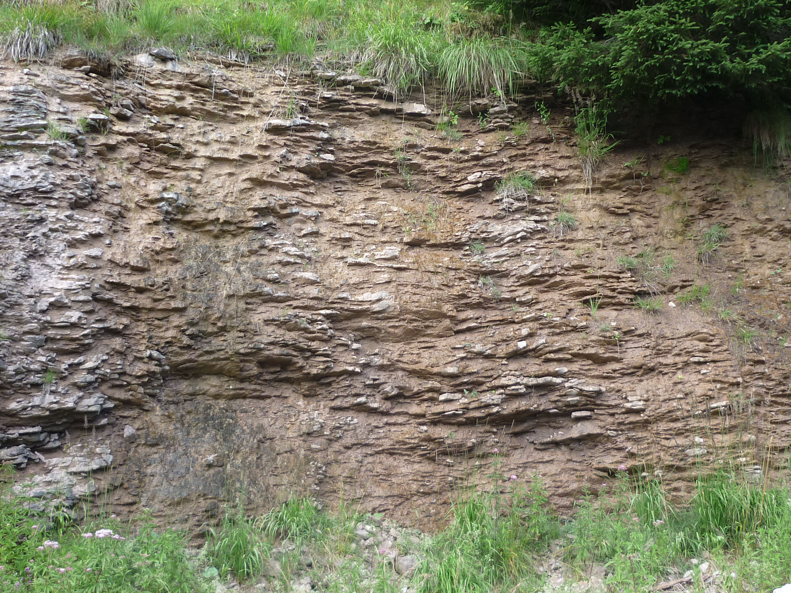 Allgäu-Schichten am Weg von Grän zum Gasthaus Adlerhorst oberhalb des Haldensee im Tannheimer Tal